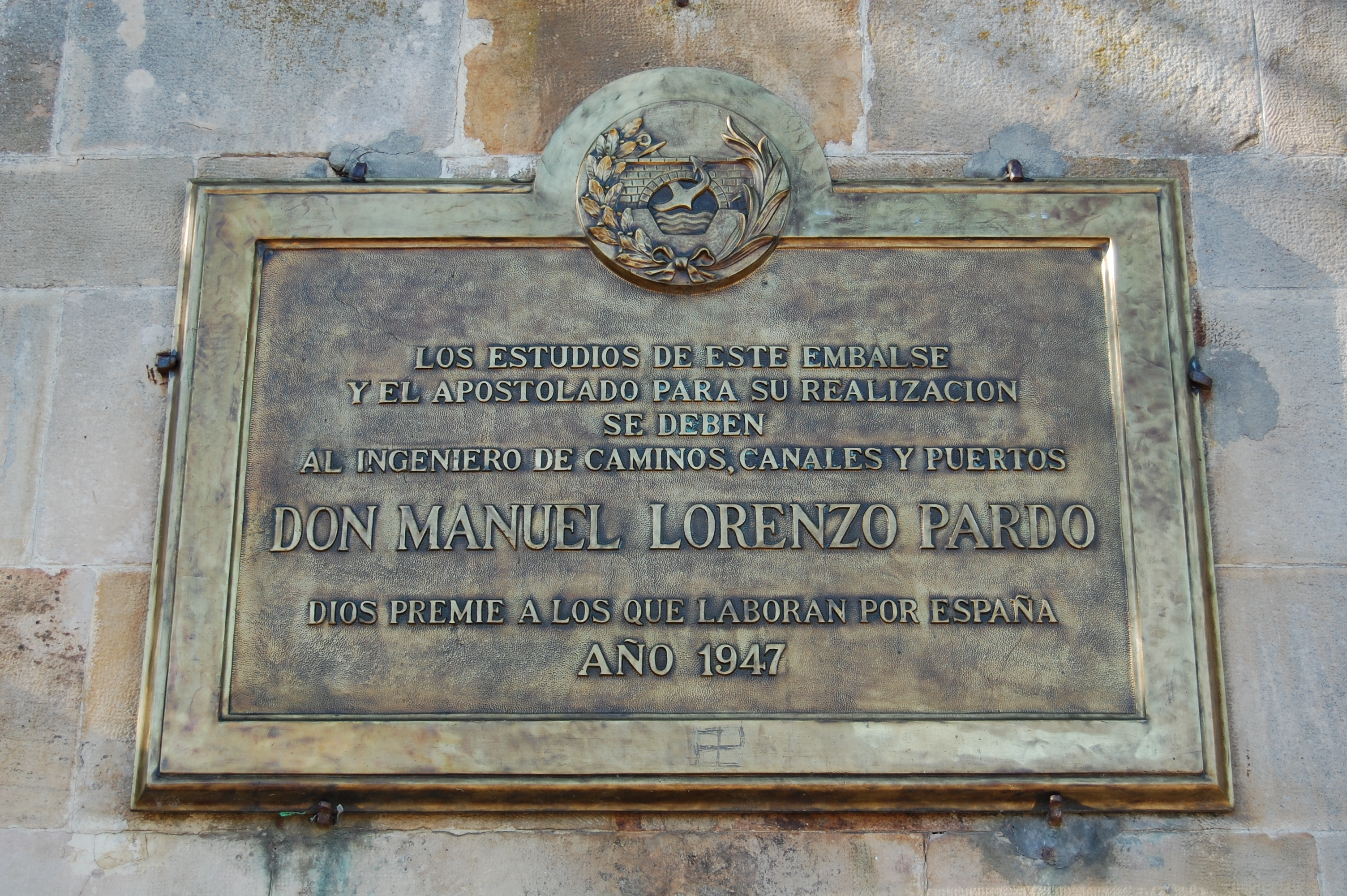 Las Rozas de Valdearroyo